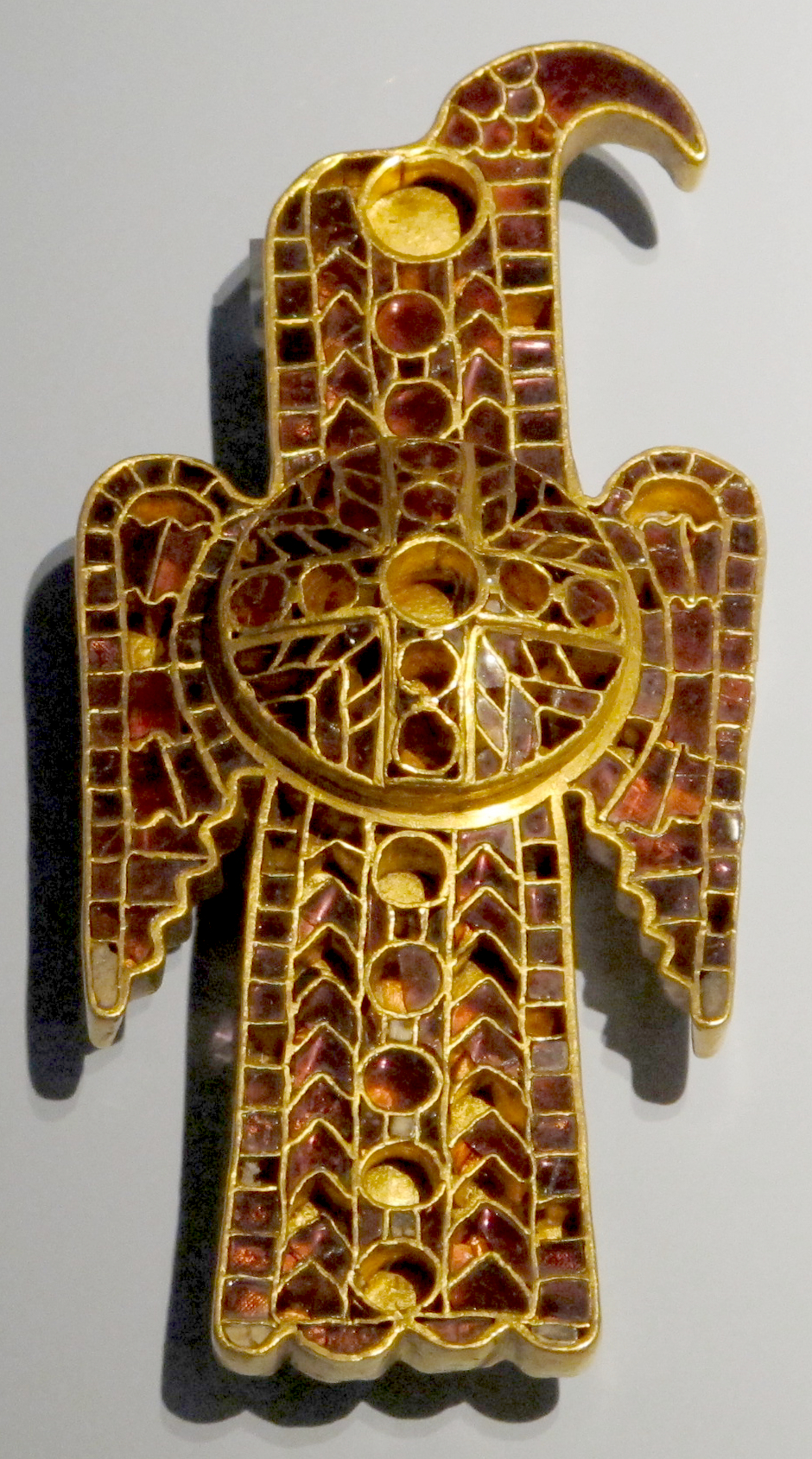 Fibula a forma d'aquila, arte ostrogota da domagnano (s. marino), 500 ca